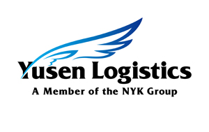 Logo de Yusen